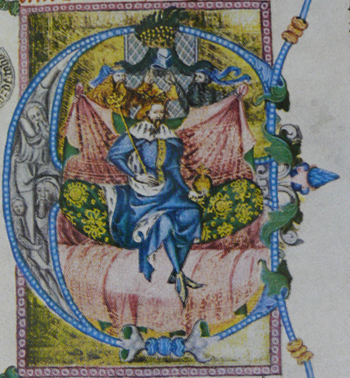 Václav IV.